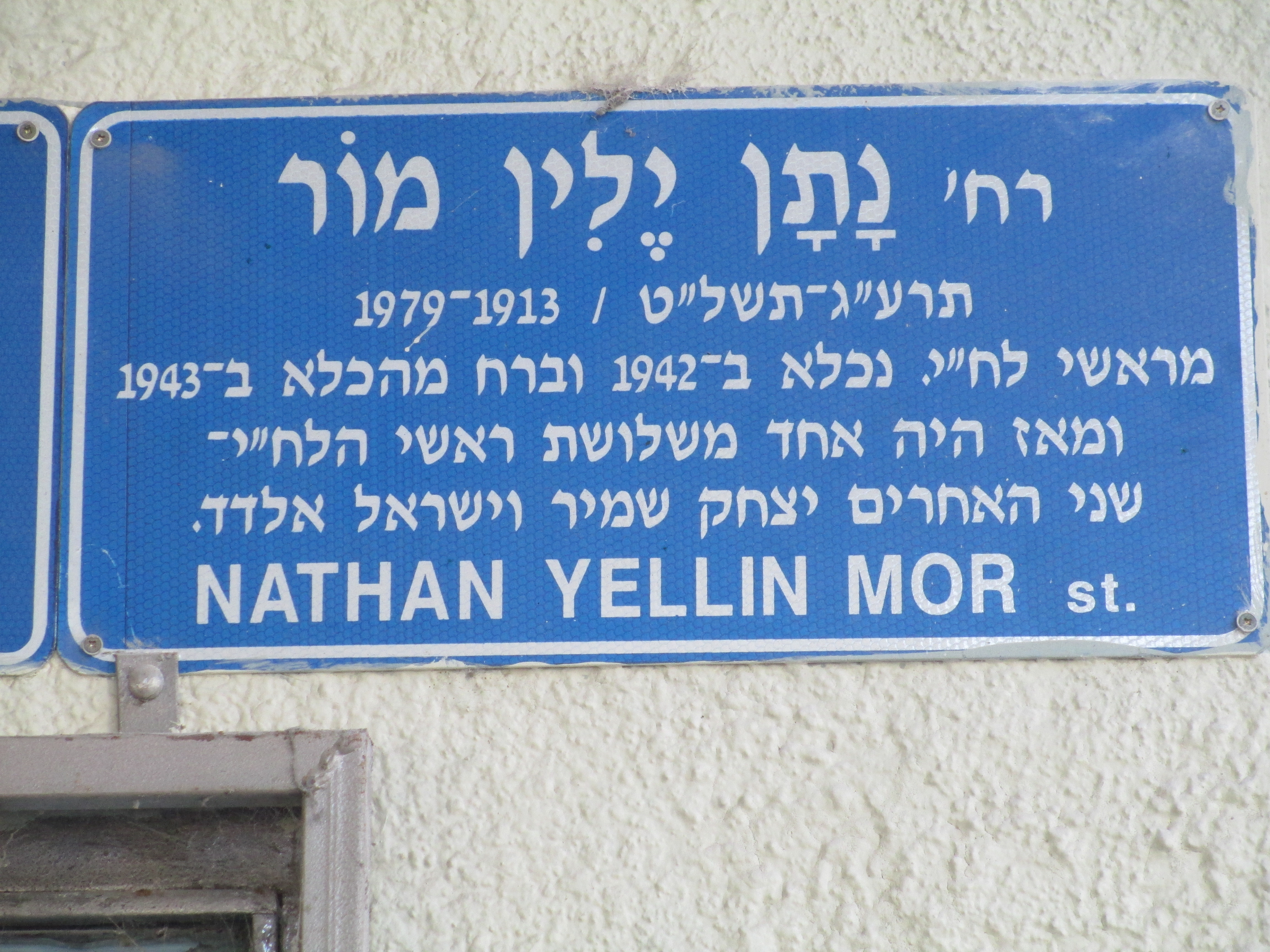 שלט רחוב נתן ילין מור בשכונת מונטיפיורי בתל אביב